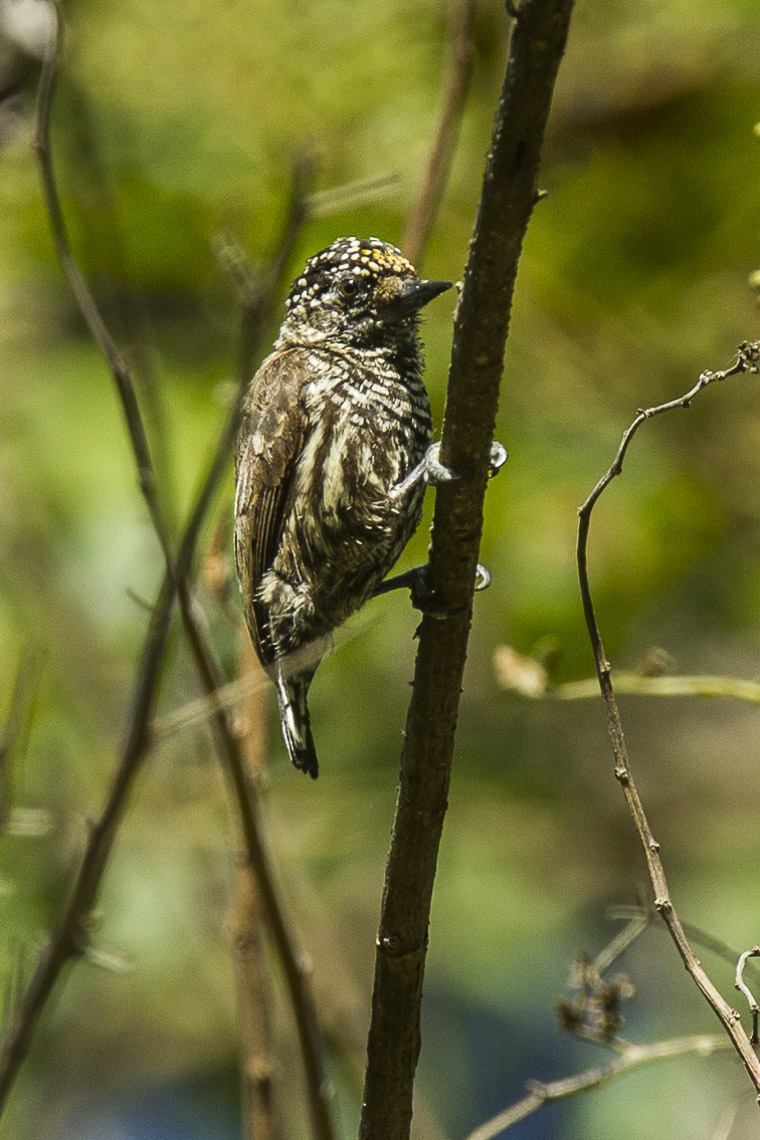 Ecuadorian Piculet - Ecuador_S4E9348